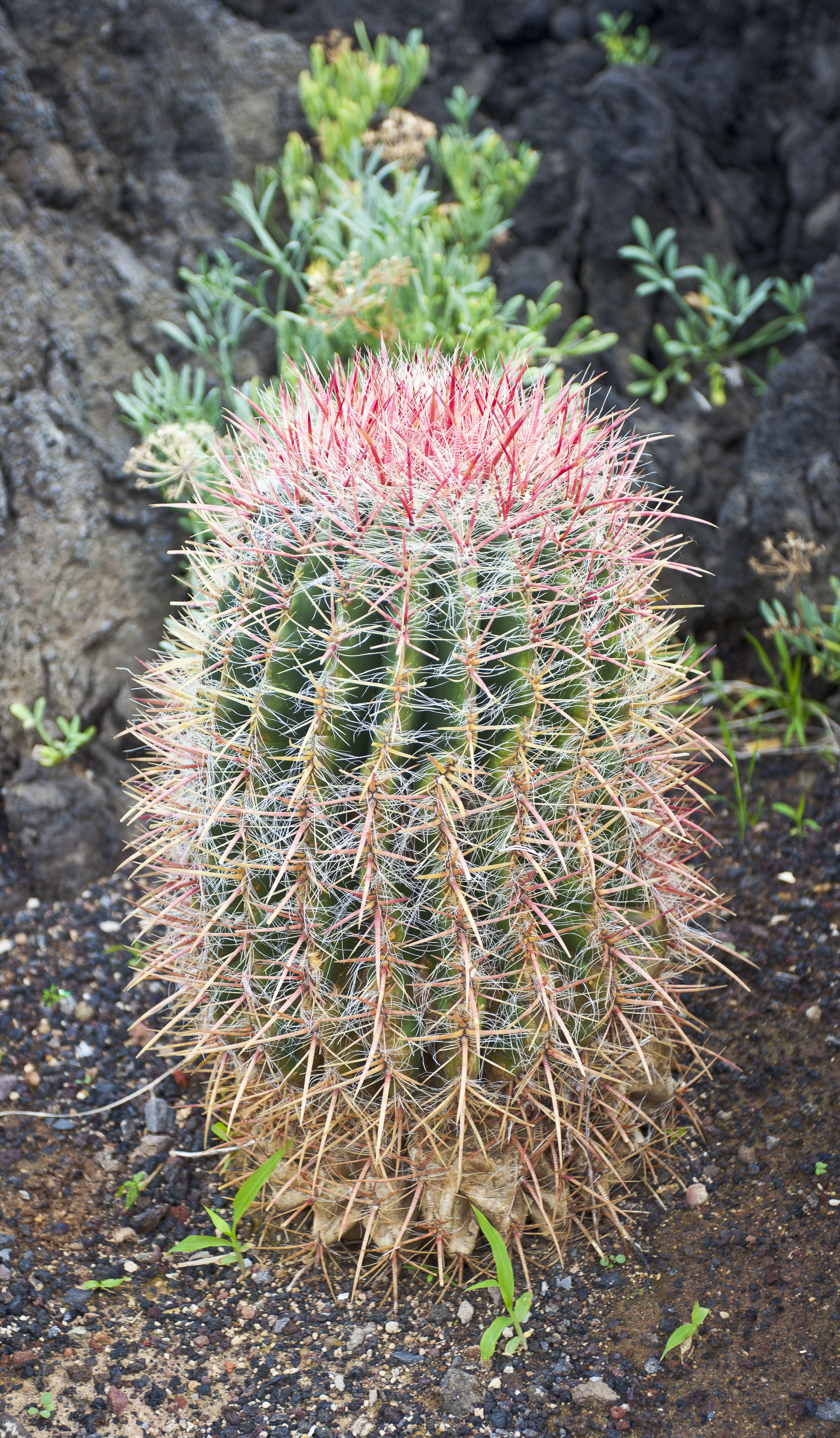 Cactus de Barril (Ferocactus pilosus), Tenerife, España